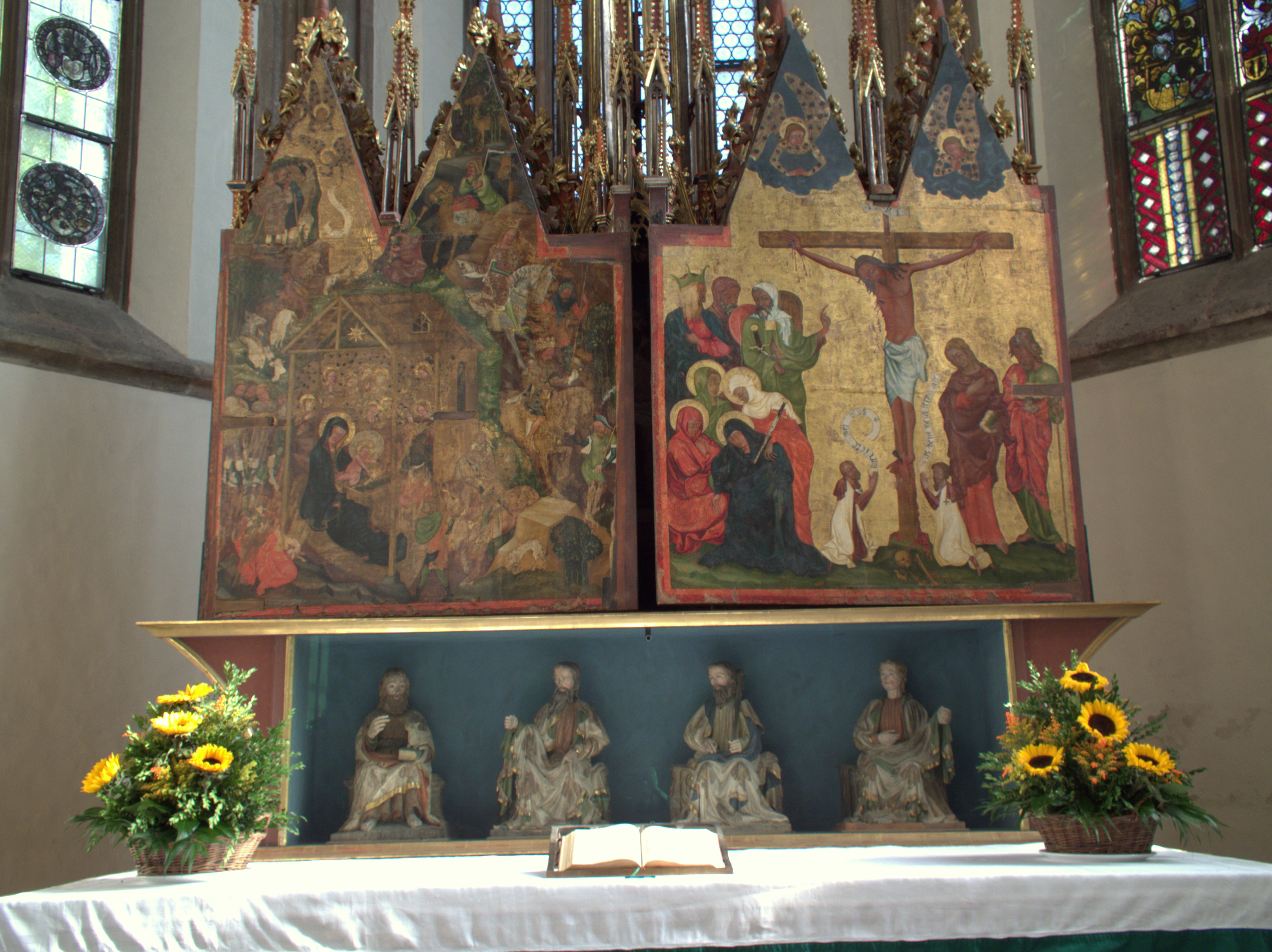 Die evangelische Pfarrkirche St. Jakob in Nürnberg